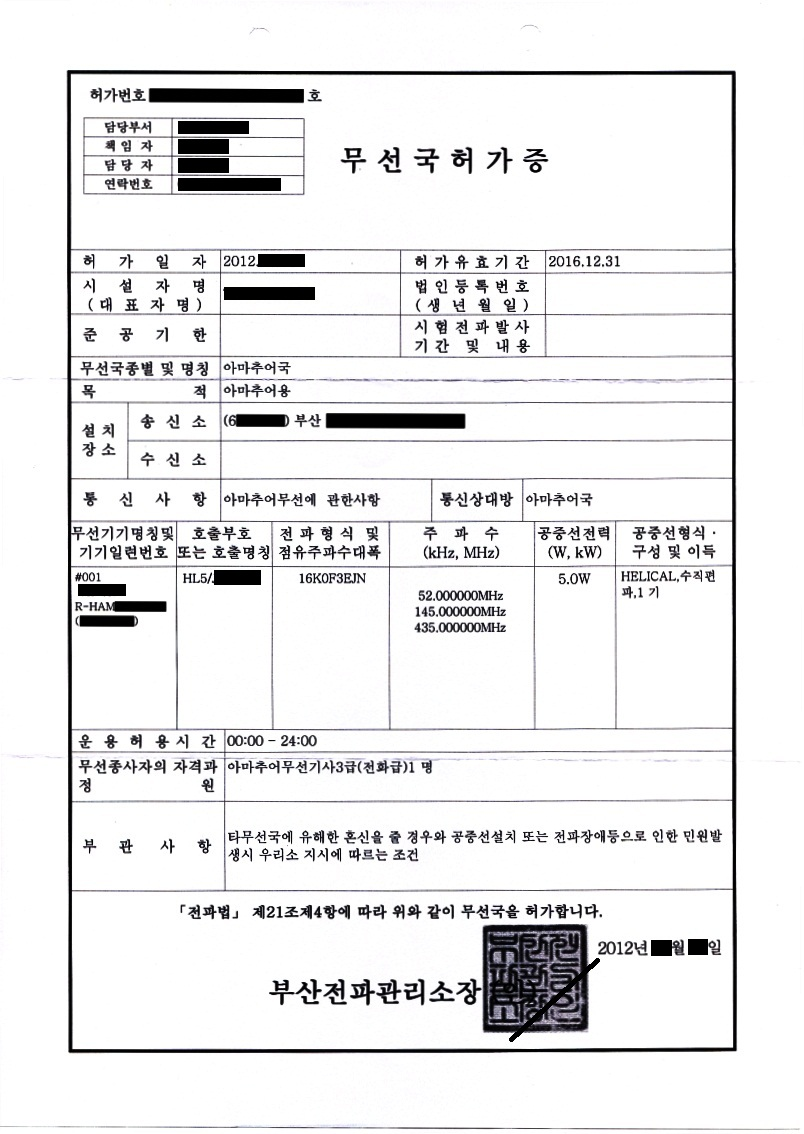 大韓民国政府（釜山電波管理所長）より交付された無線局許可証